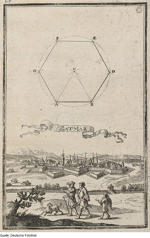 Original image description from the Deutsche FotothekGeometrie & Architektur & Festungsbau & Vermessung